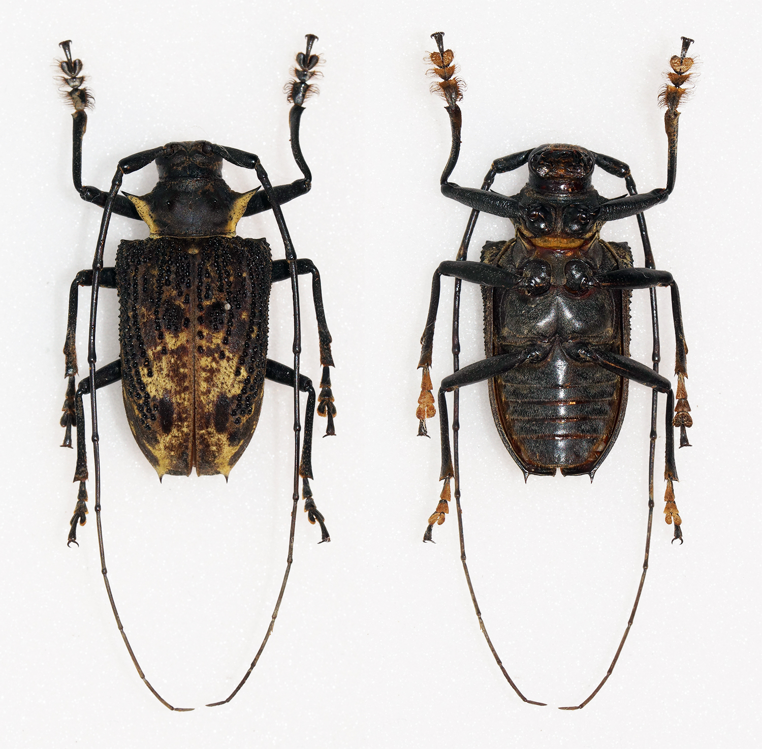 Lane,1965 Sex: Male Data: 10-2011 - Junin - Rio Tambo - Satipo - Peru Size: 31mm